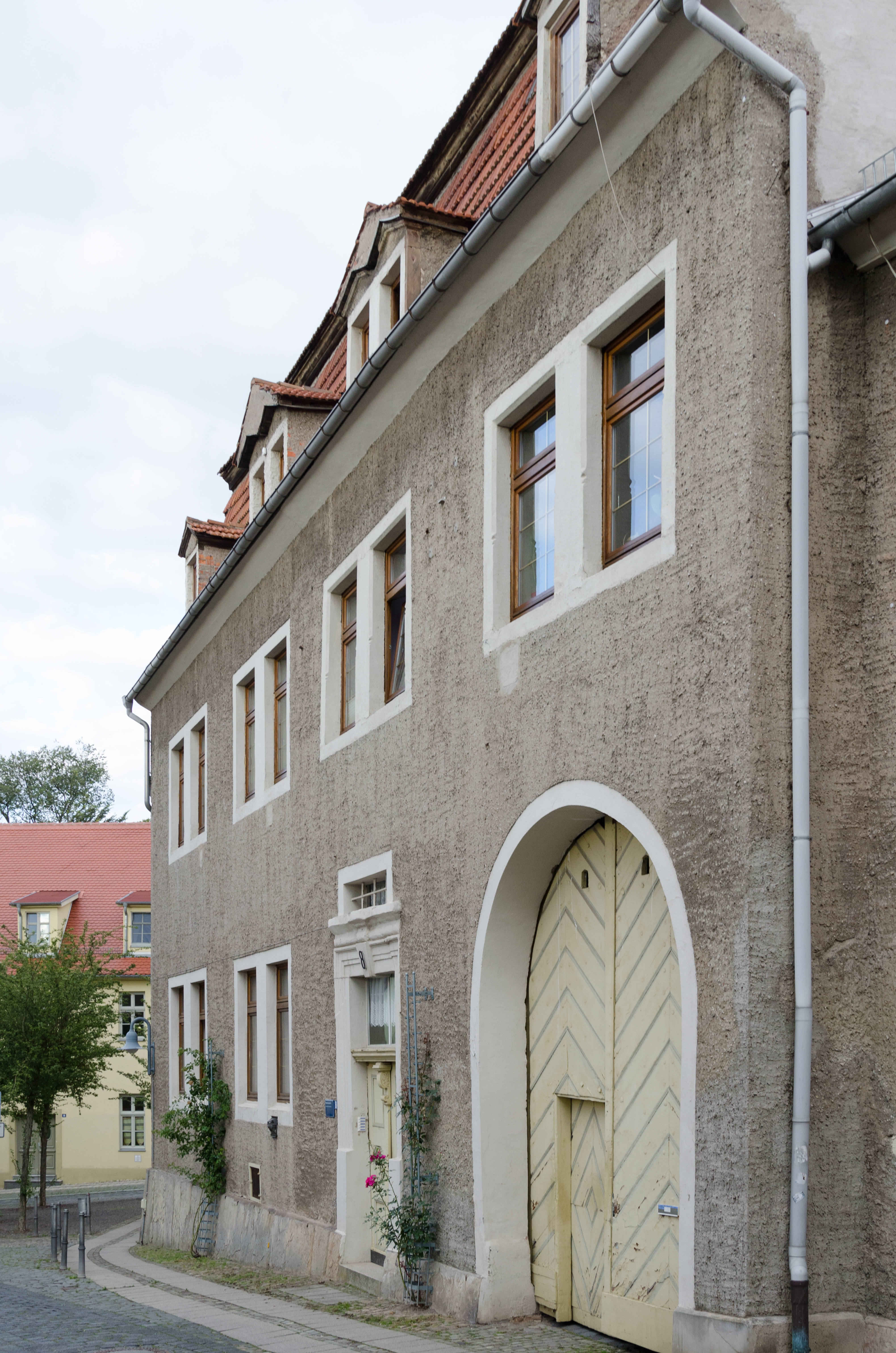 Sangerhausen, Wassertorstraße 8